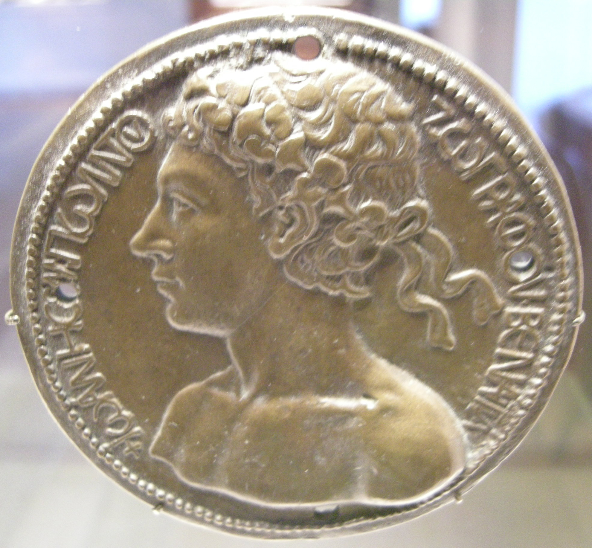 Medaglia con autoritratto, 1458, recto